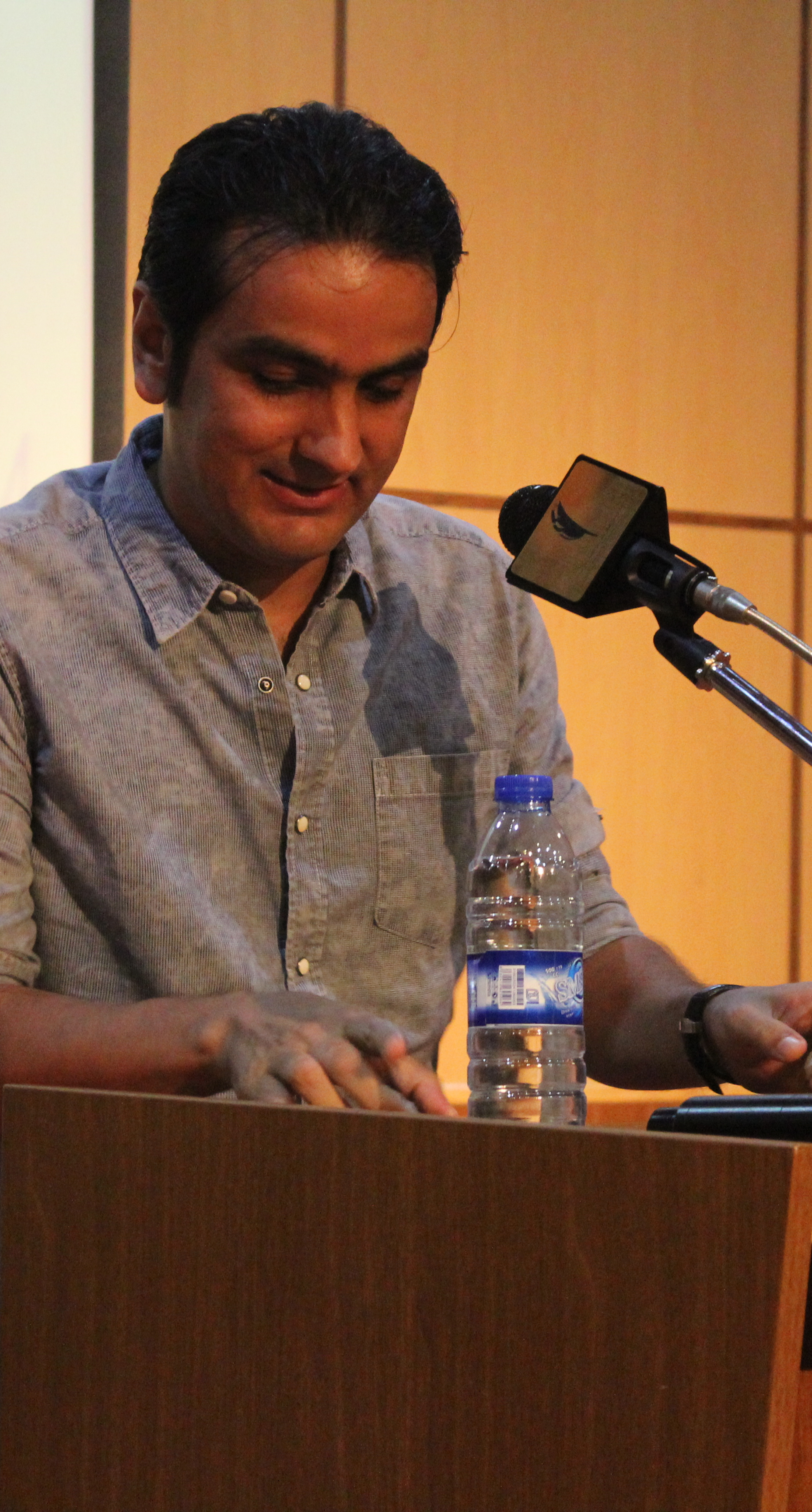 حسین غیاثی در کنگره سه نسل با ادبیات